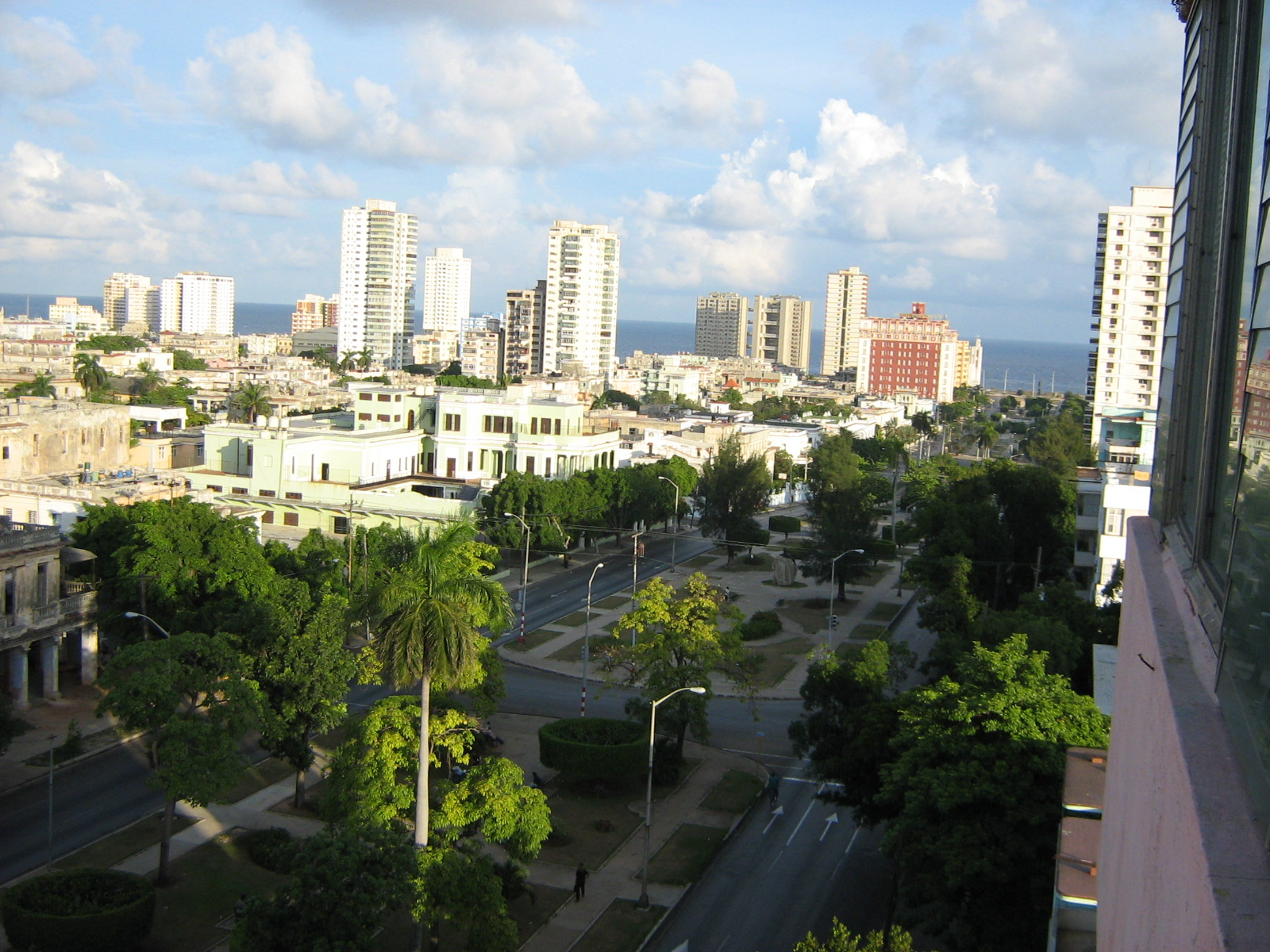 Avenida de los presidentes y calle 17, desde mi balcon en la barriada del Vedado en La Habana.